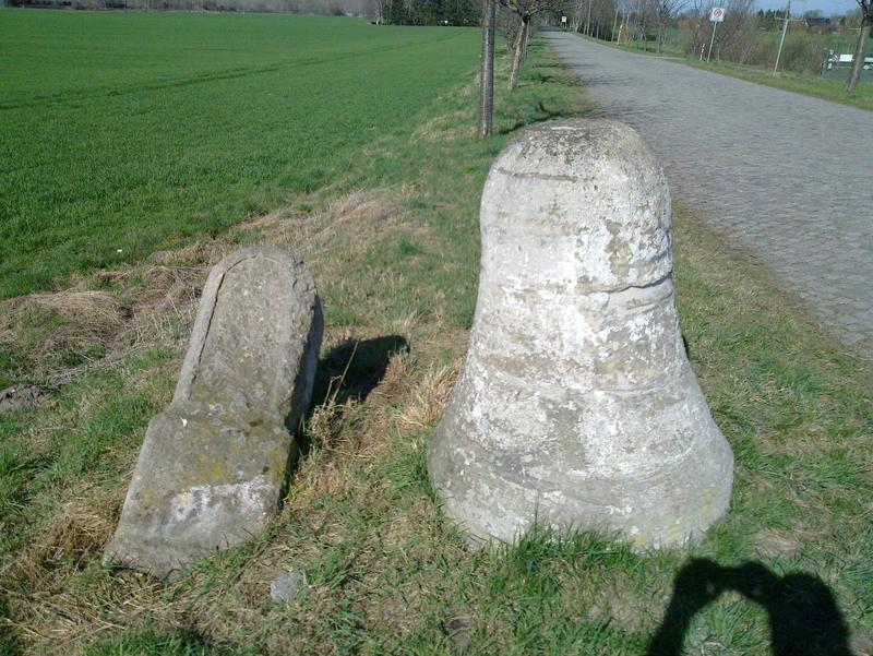 Preußischer Halbmeilenstein große Glocke in Beersdorf